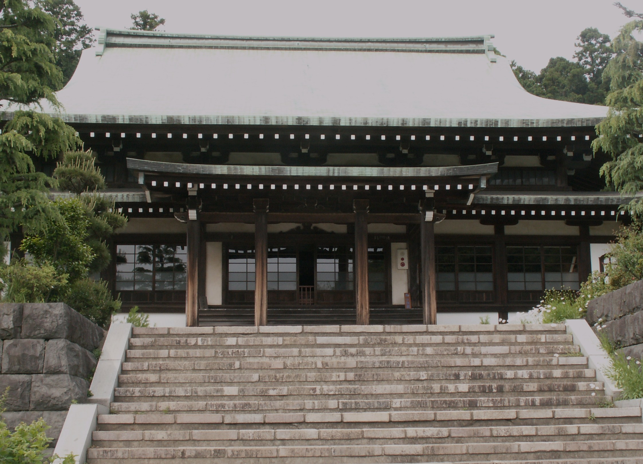 龍宝寺本堂